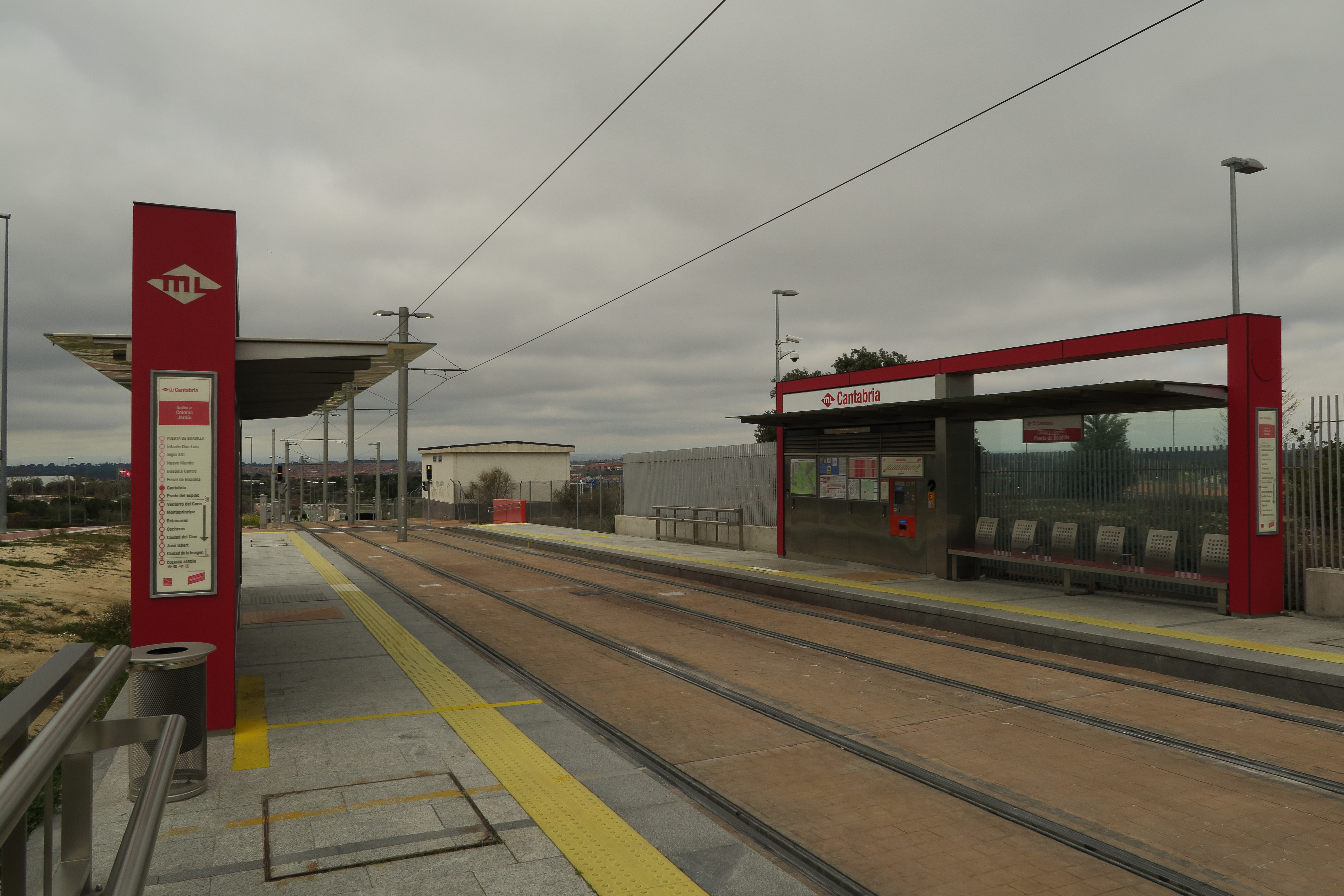 Estación de Cantabria